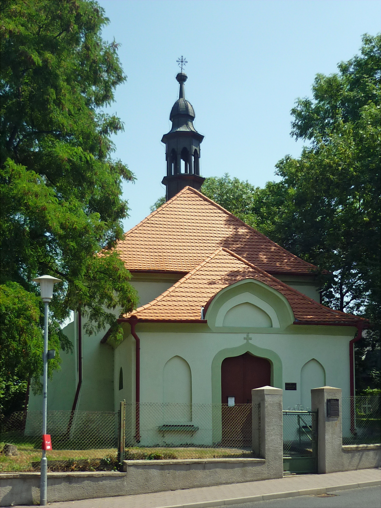 Jakobskirche in Saaz/Žatec in der Jakobsgasse (Tyršova), jetzt orthodoxe Kirche